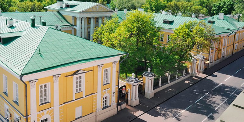 Усадьба Барышкина на Мясницкой